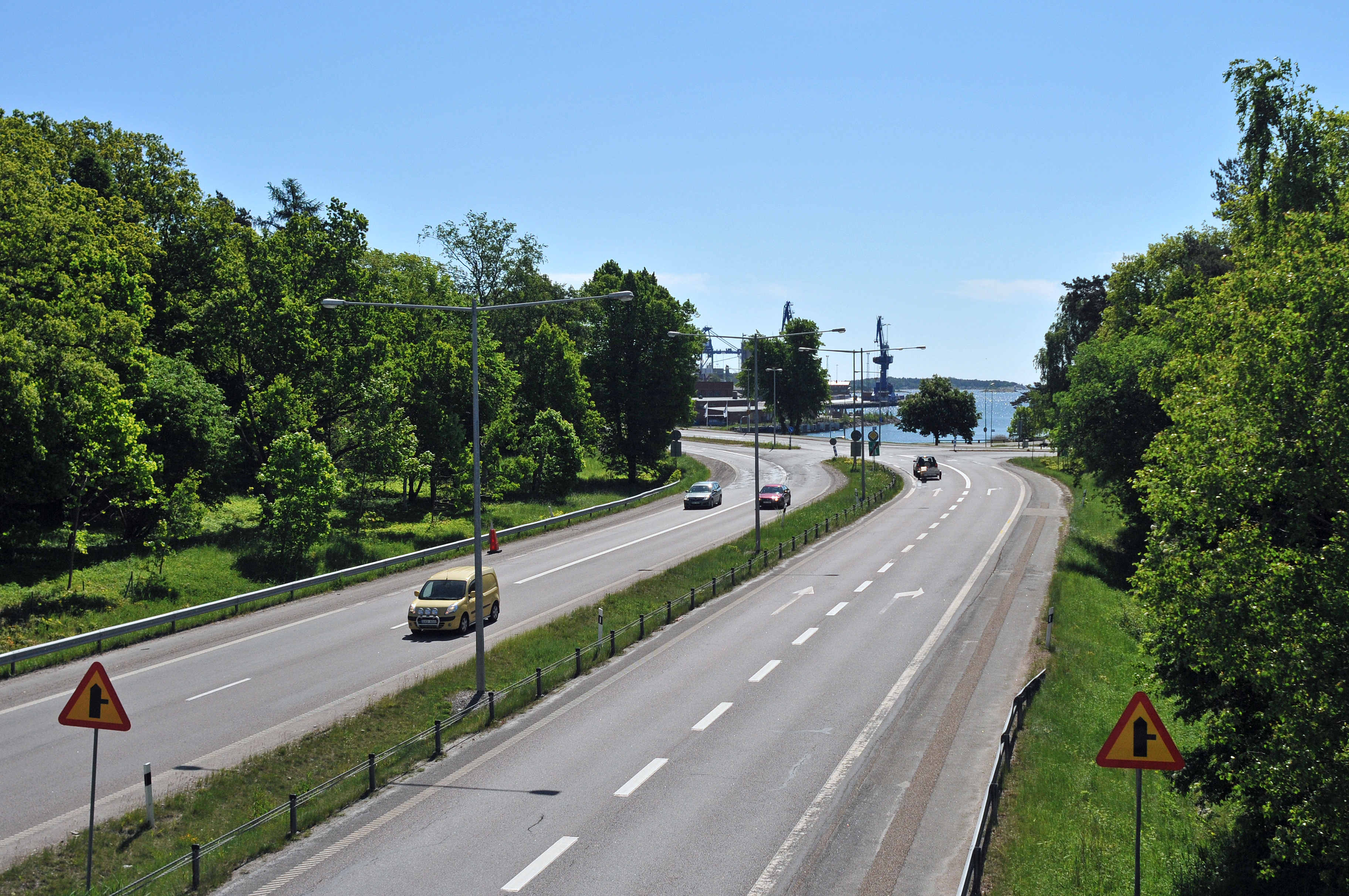 Motorvägen till Oxelösund.